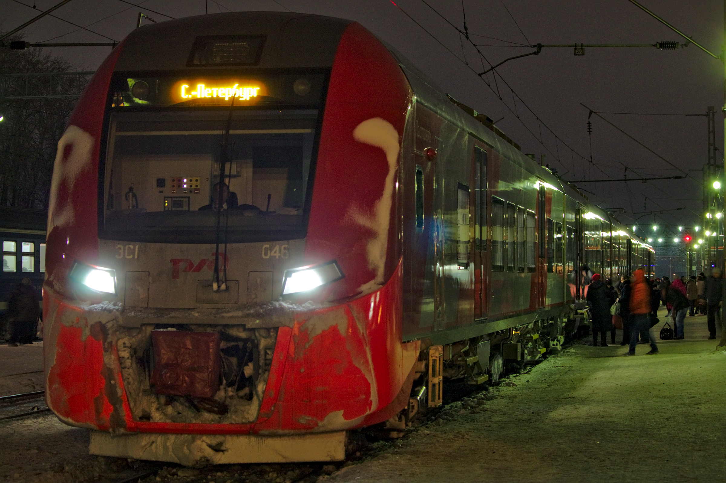 ЭС1-046, станция Петрозаводск. см. фото 637901 в альбоме автора